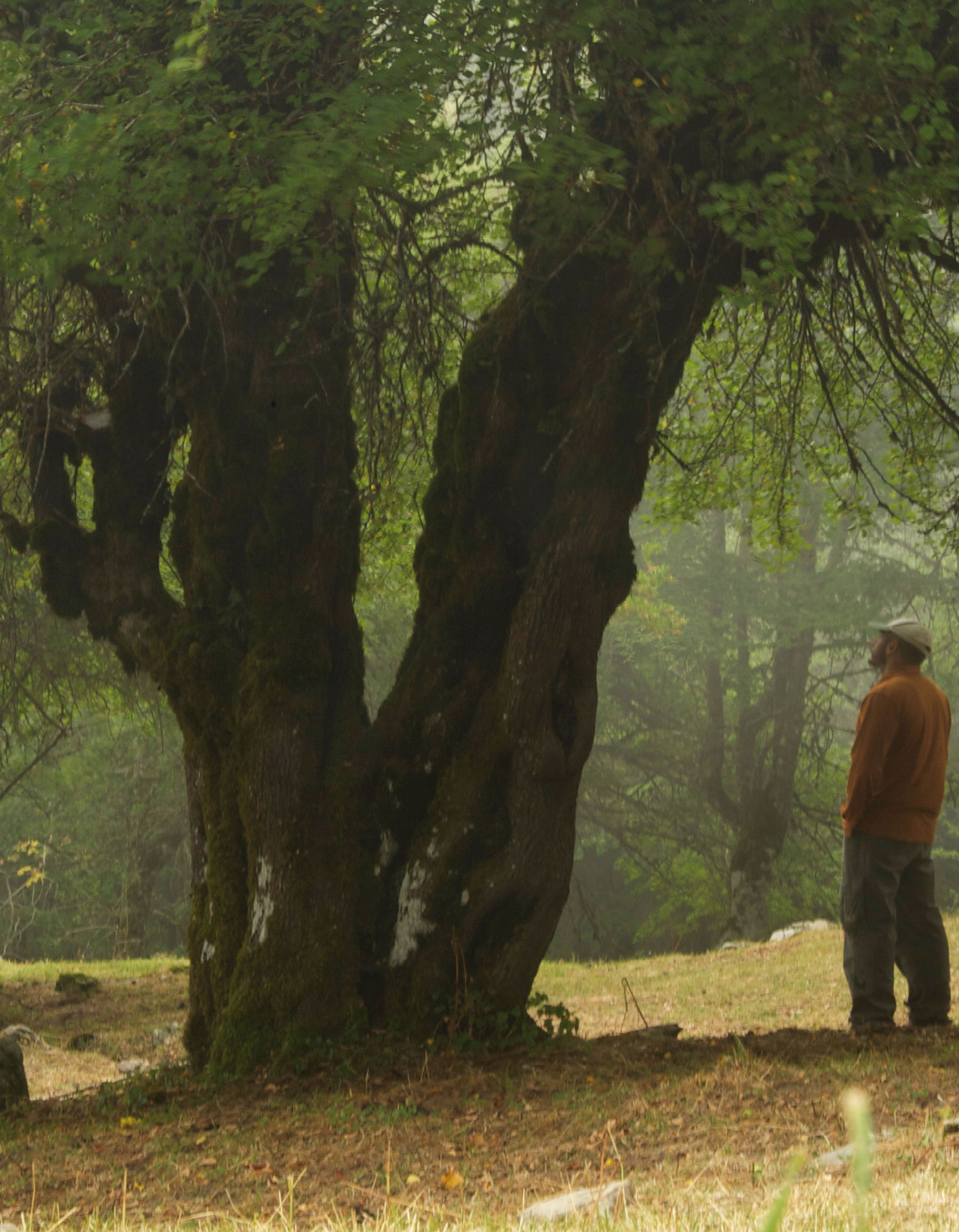 Albero